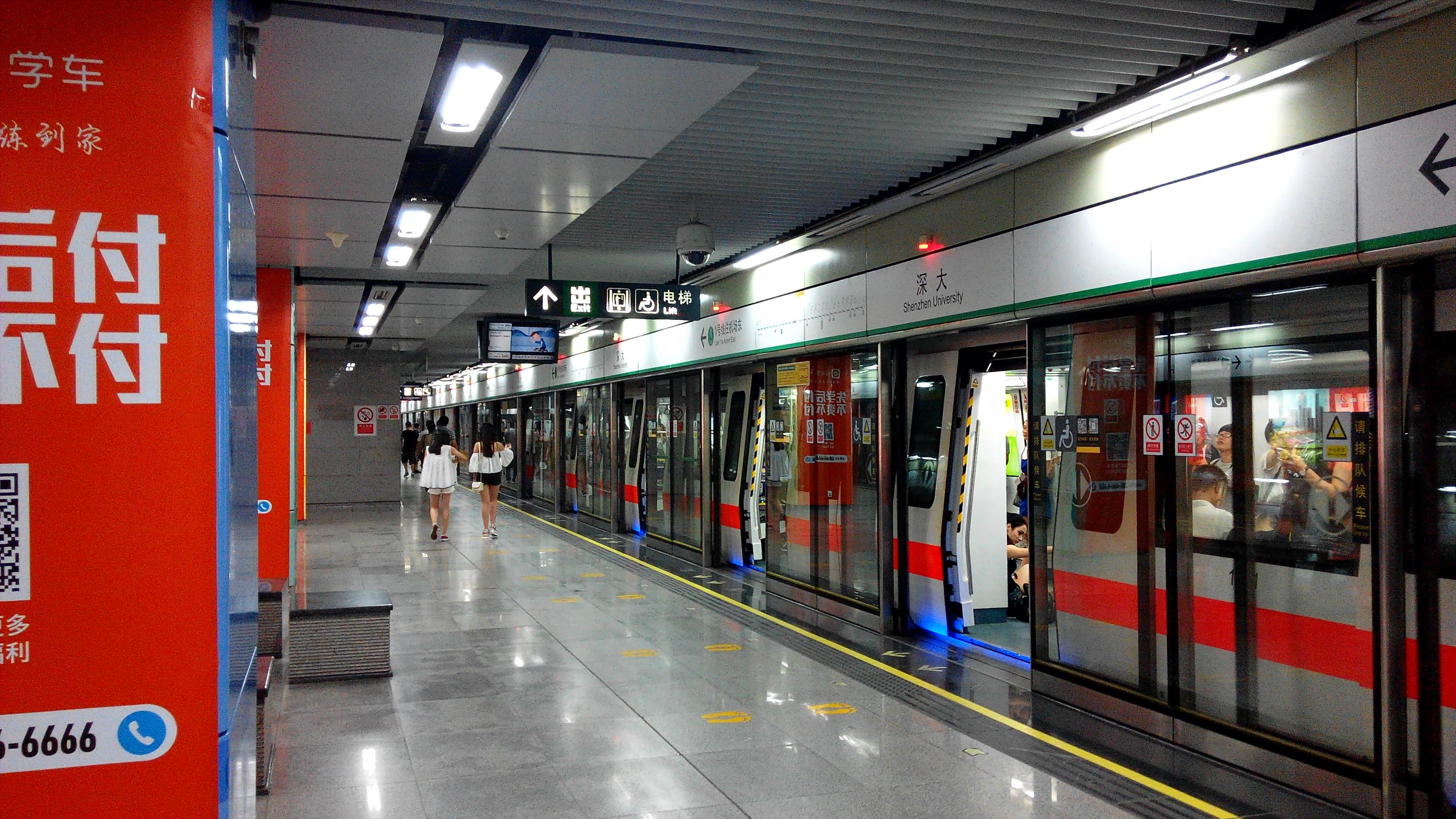 深圳地铁1号线 深大站 站台